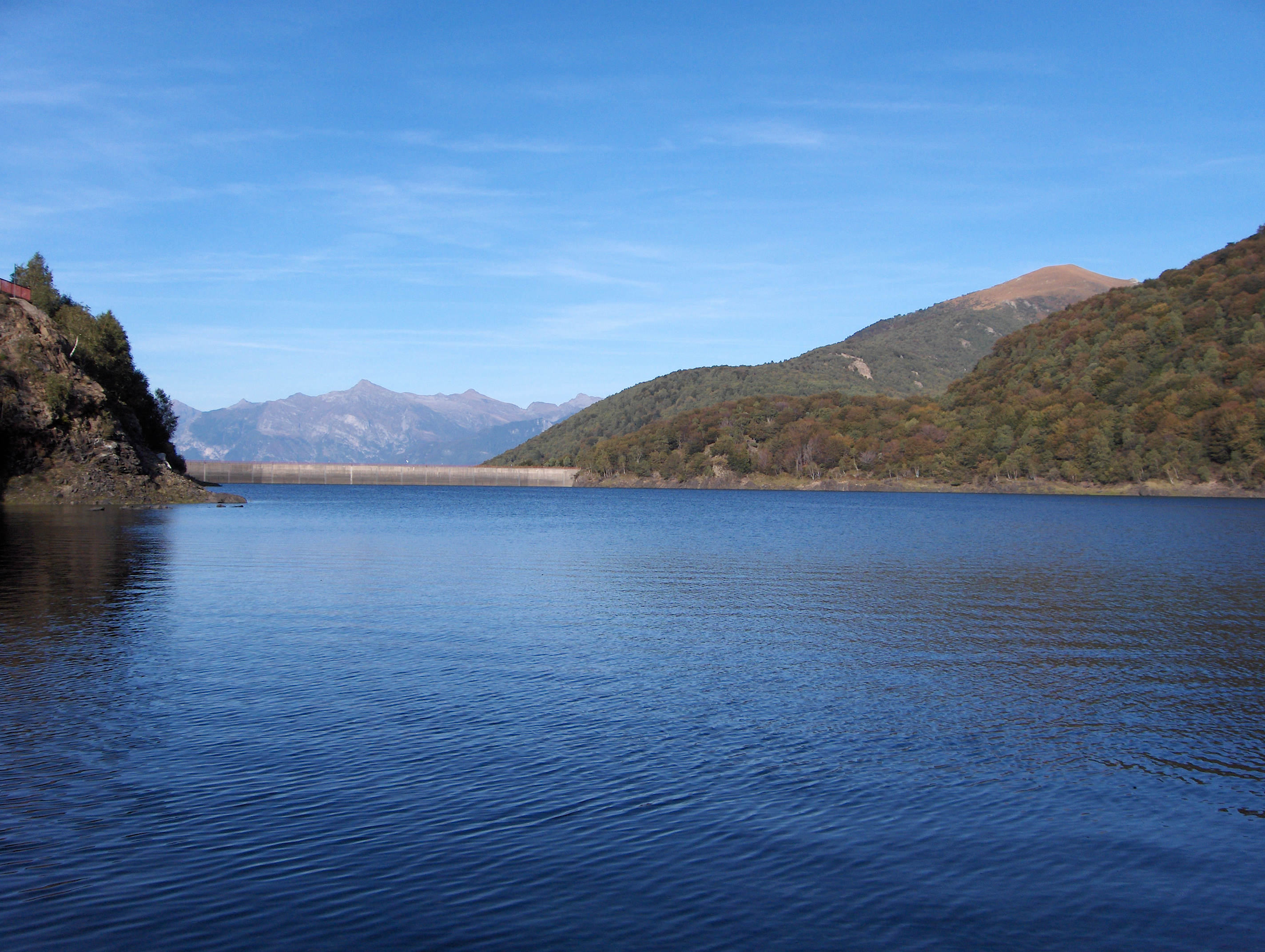 Vista del Lago d'Elio (Varese).